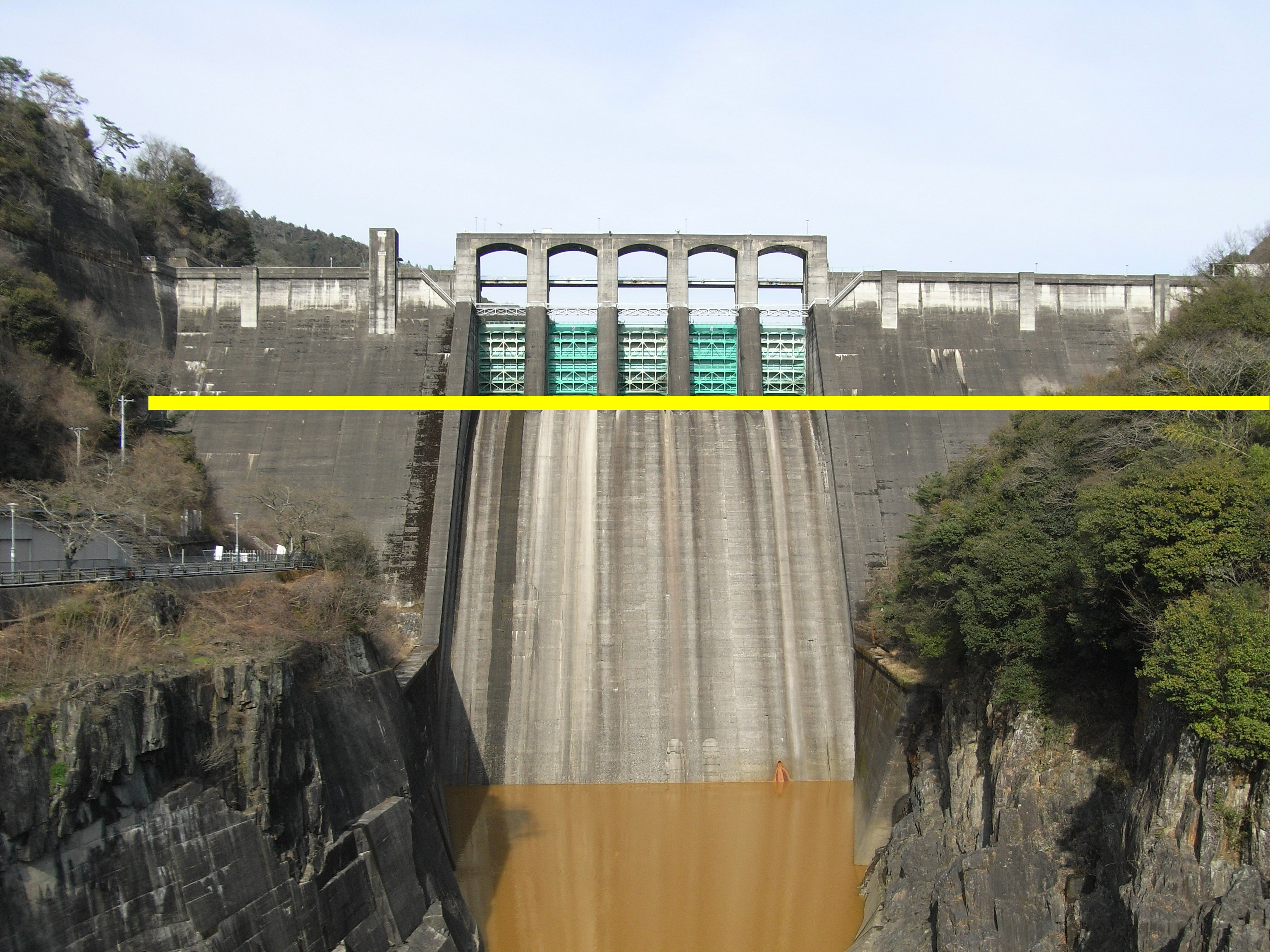 Dam